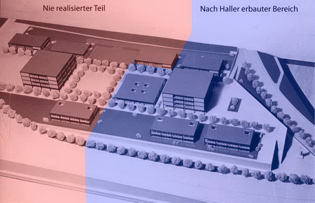 Foto des Projektmodels der Kantonsschule Baden - von Architekt Fritz Haller